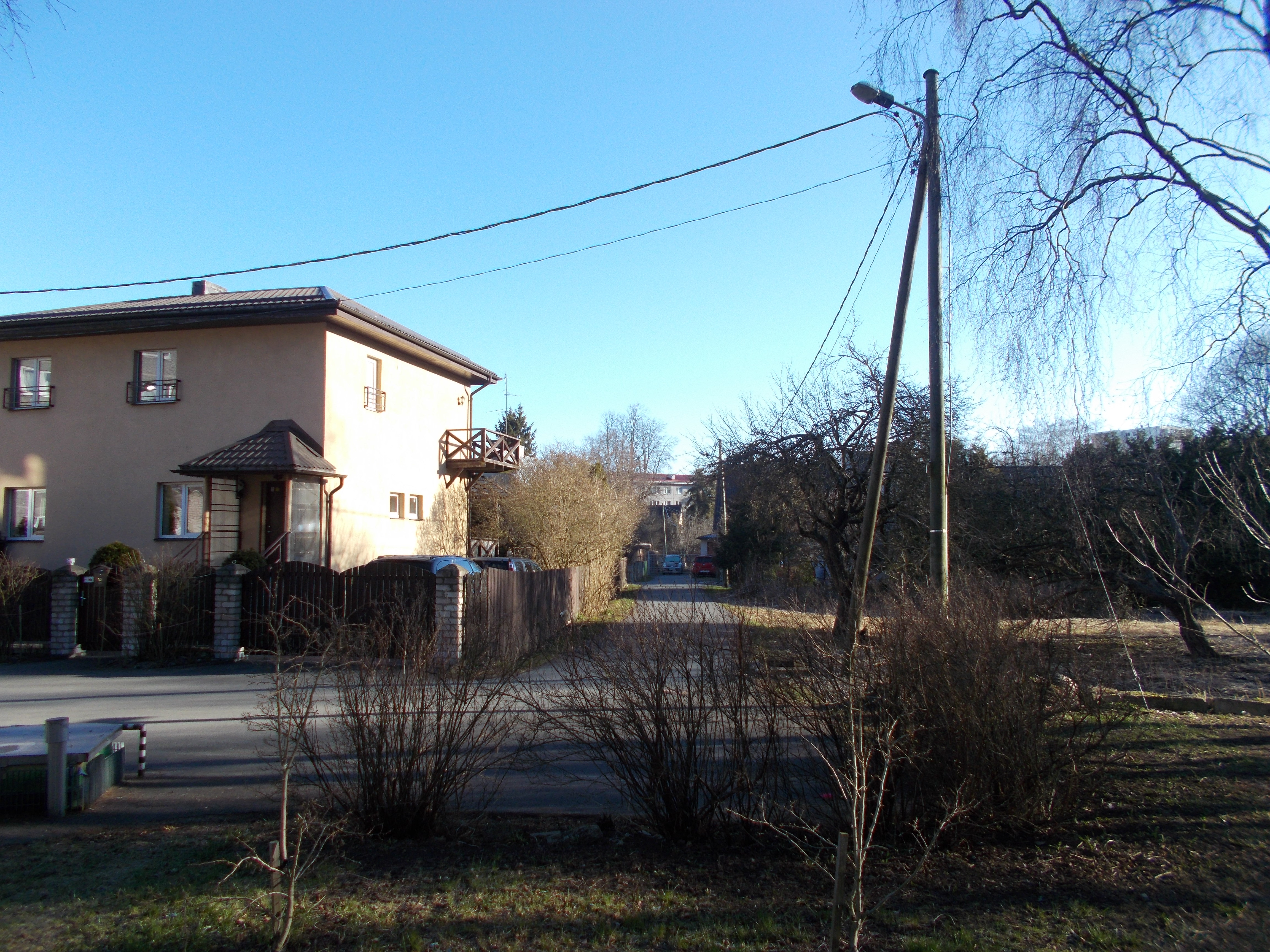 Vaade Lepatriinu tänavale Mustamäel